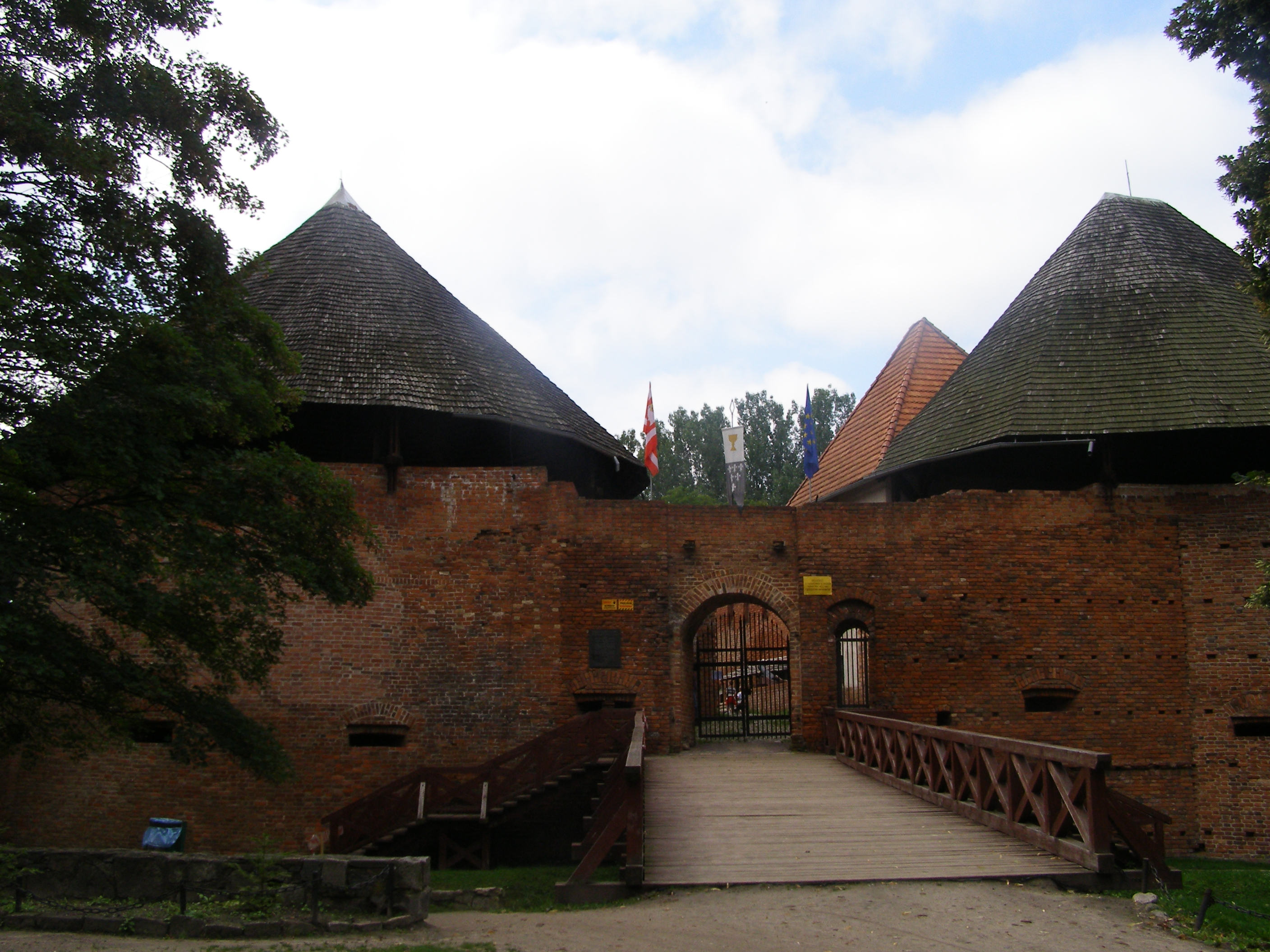 Międzyrzecz, zespół zamkowy, XIV, XIX